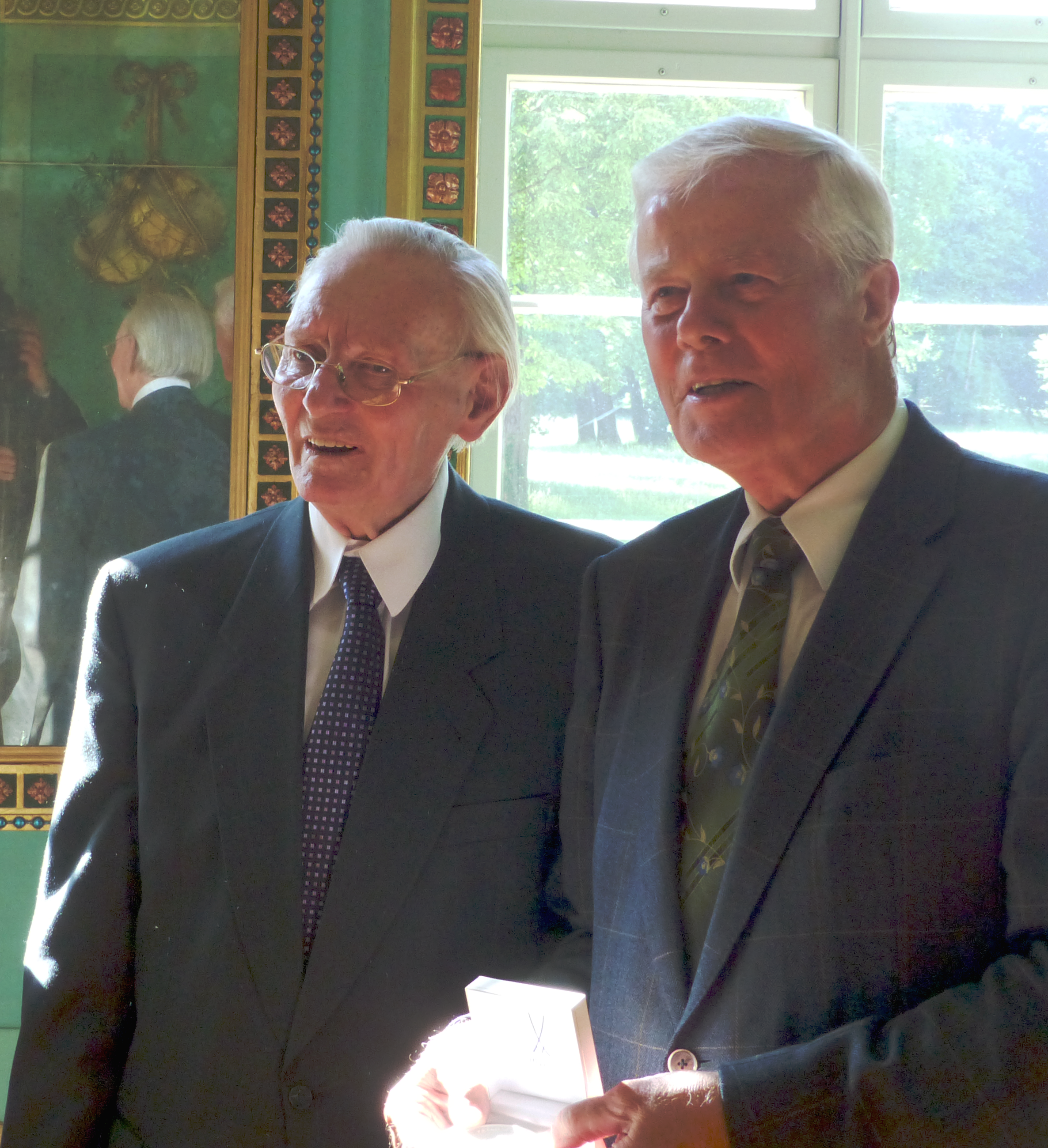 Helmut Rippl erhält Lenné-Medaille.